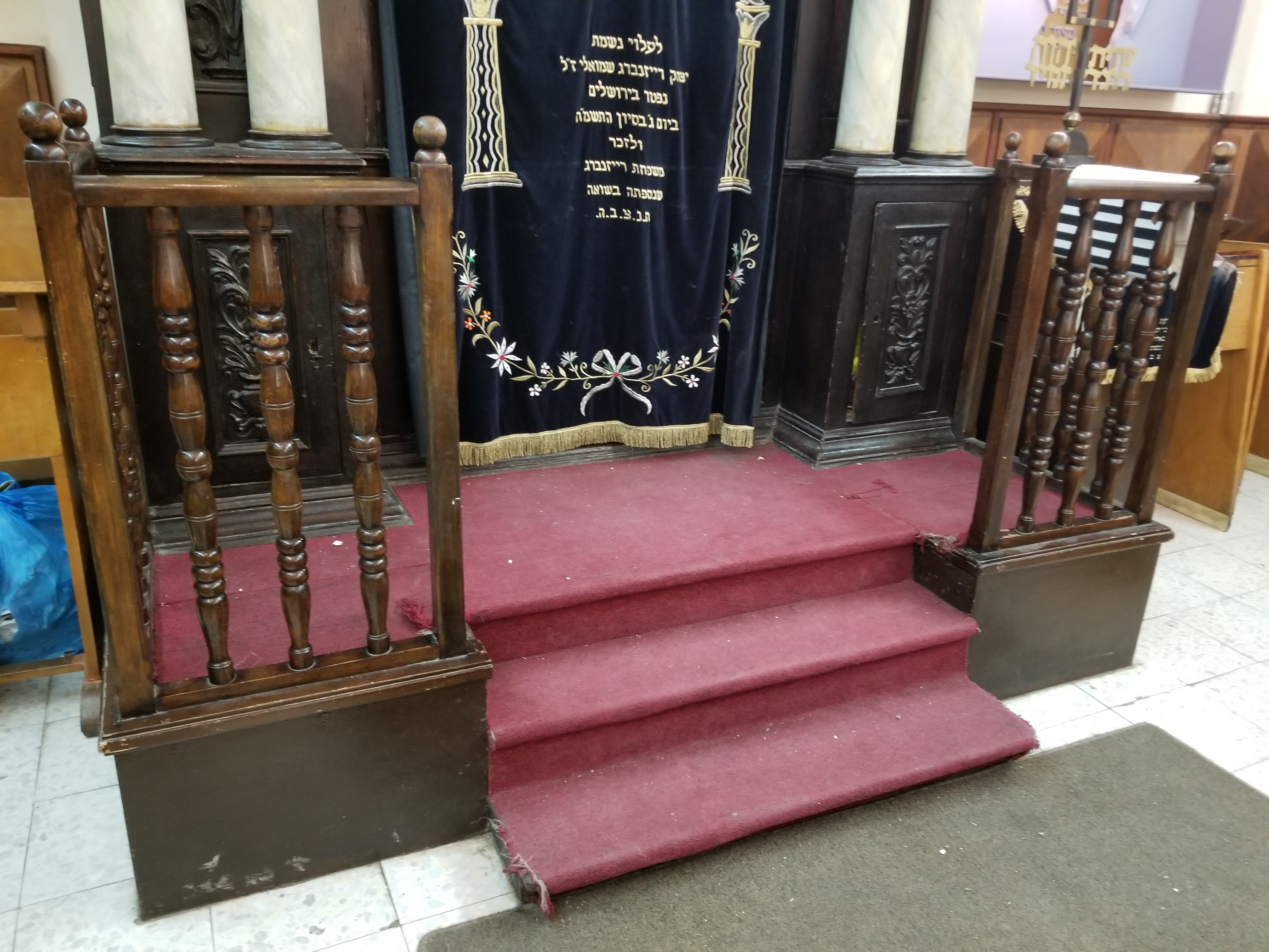 הסליק תחת ארון הקודש בבית הכנסת אחדות ישראל כשהוא סגור